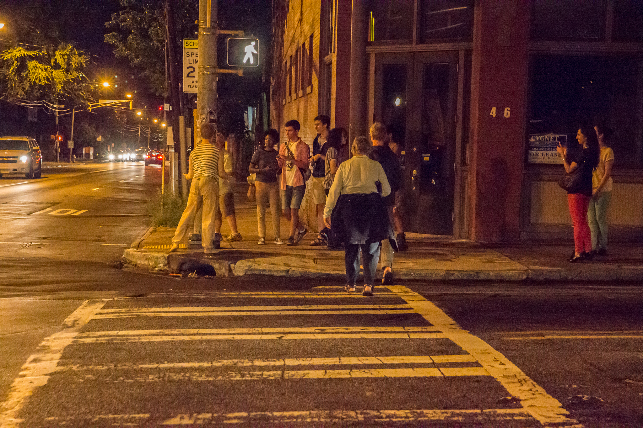 Edgewood Avenue, Atlanta